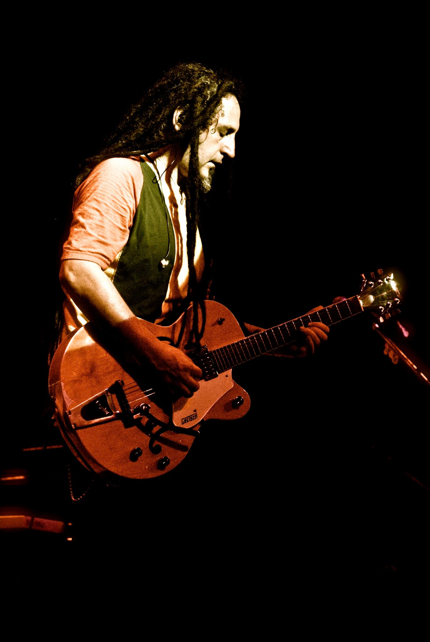 Foto de Goy, kantente de Karamelo Santo